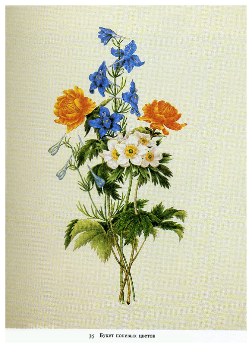 Букет полевых цветов